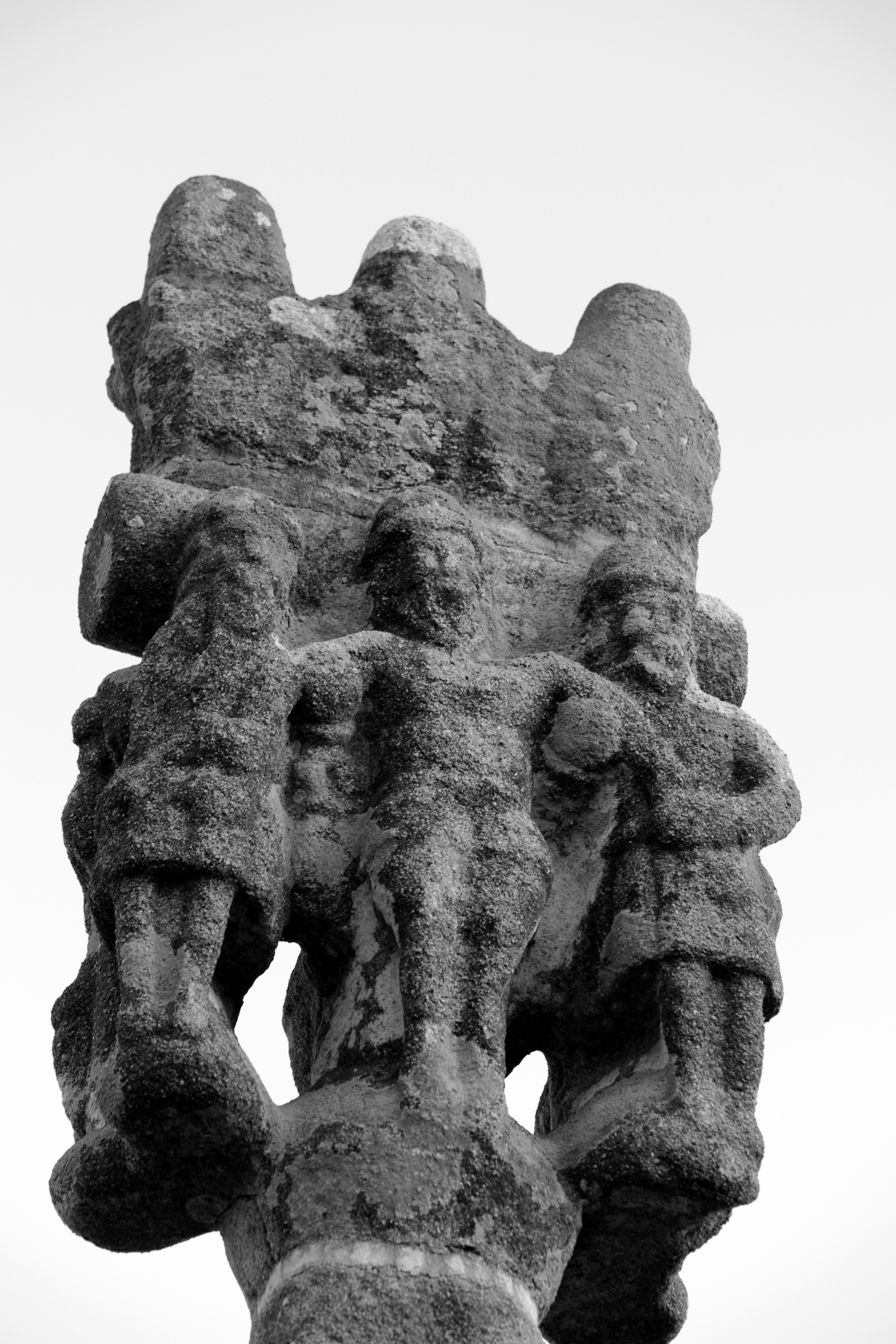 Croix de la Sauraie, Kermaria (route de) (Inscription, 1926)